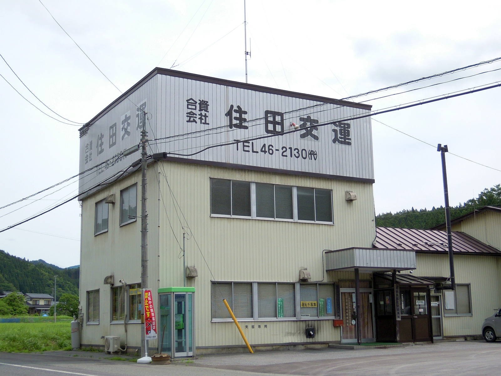 岩手県気仙郡住田町にある住田交運の社屋外観